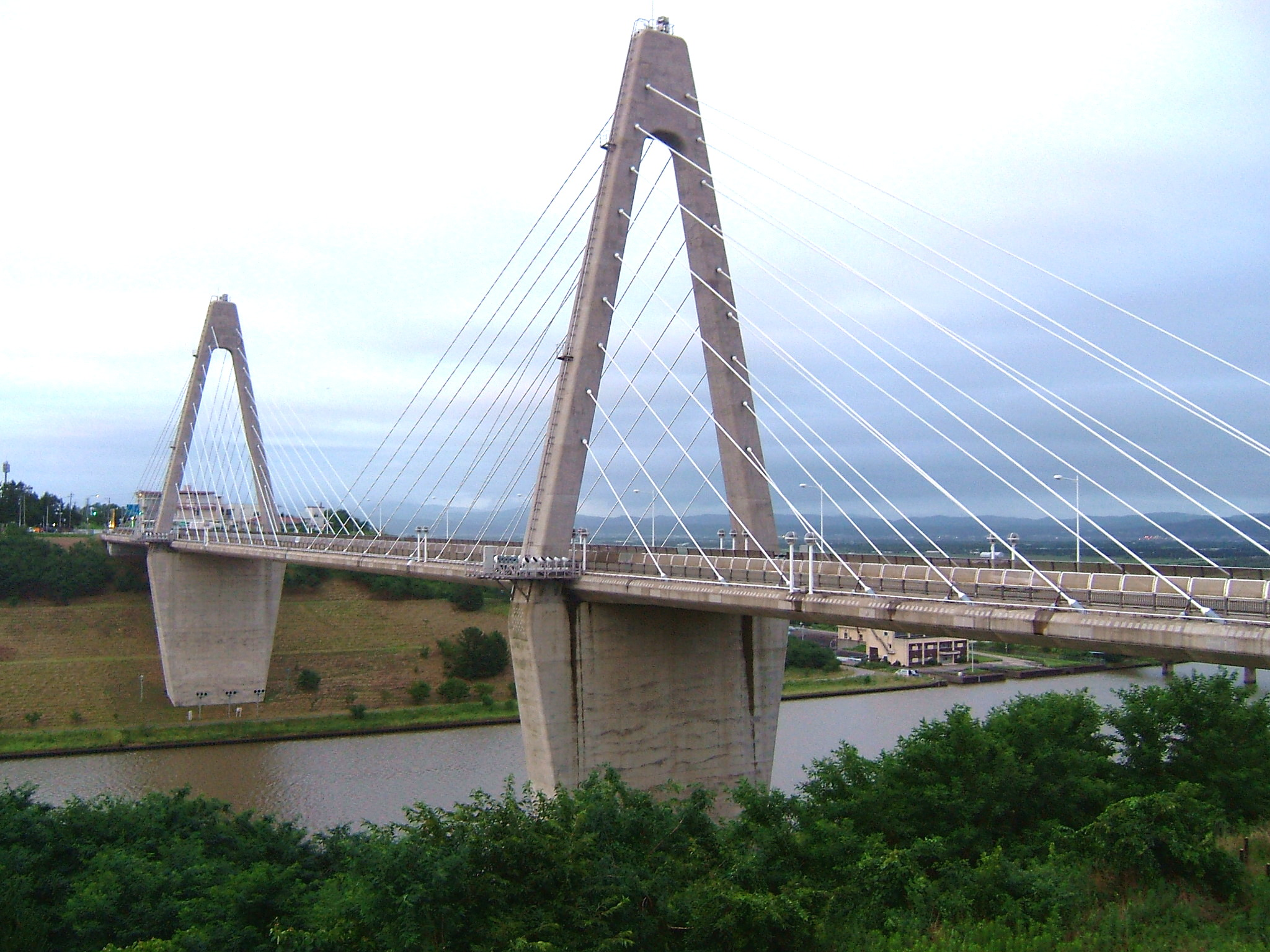 石川県河北郡内灘町の内灘大橋。